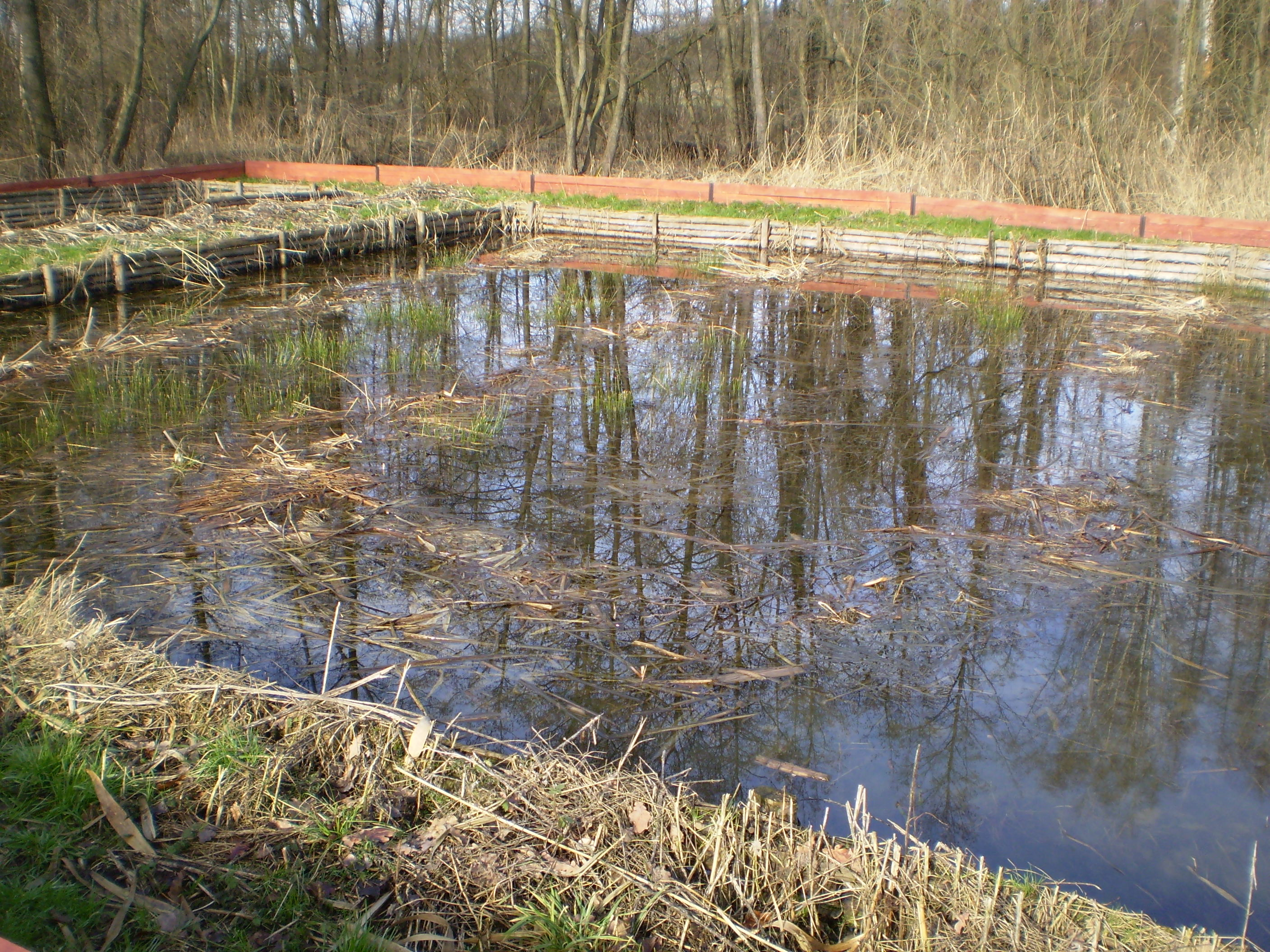 Plůdkový rybníček pod hrází rybníka Datlík, stav v únoru 2007.